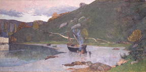 Breton: Bet livet e 1893-1894.title QS:P1476,br:"Bet livet e 1893-1894." label QS:Lbr,"Bet livet e 1893-1894." label QS:Lfr,"Le port de Pont-Aven (vers 1893-1894)"